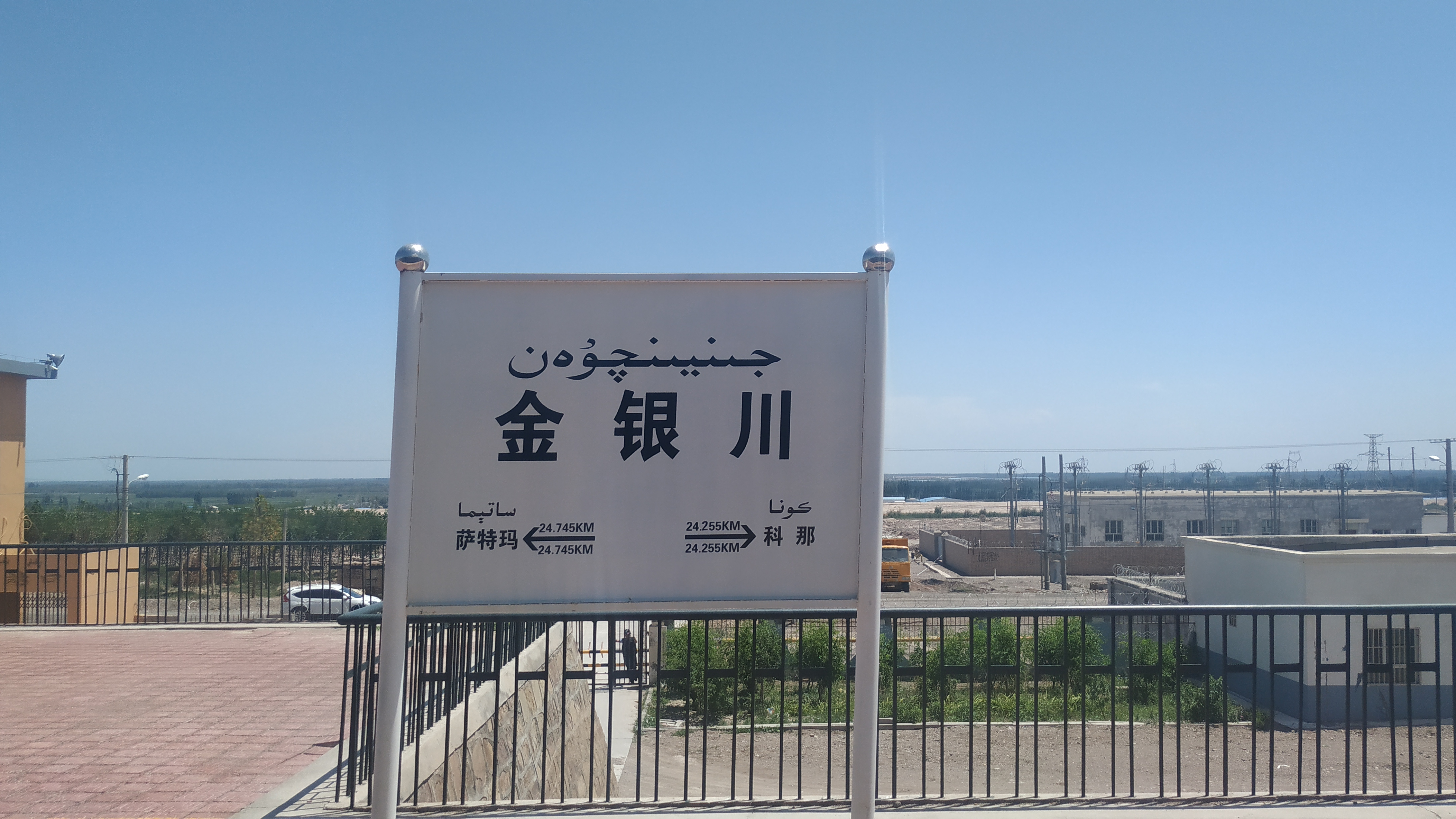 中文（中国大陆）: 金银川站站牌